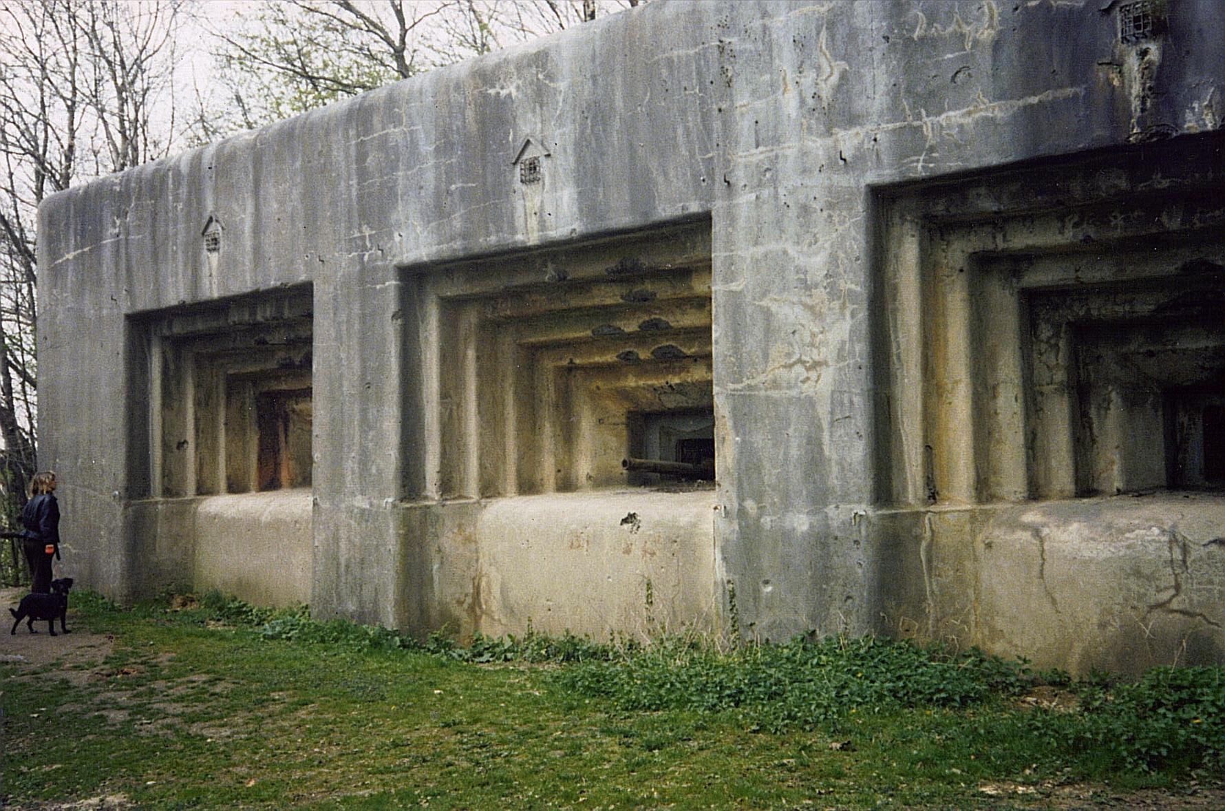 Eben Emael Kasematte Vise 2